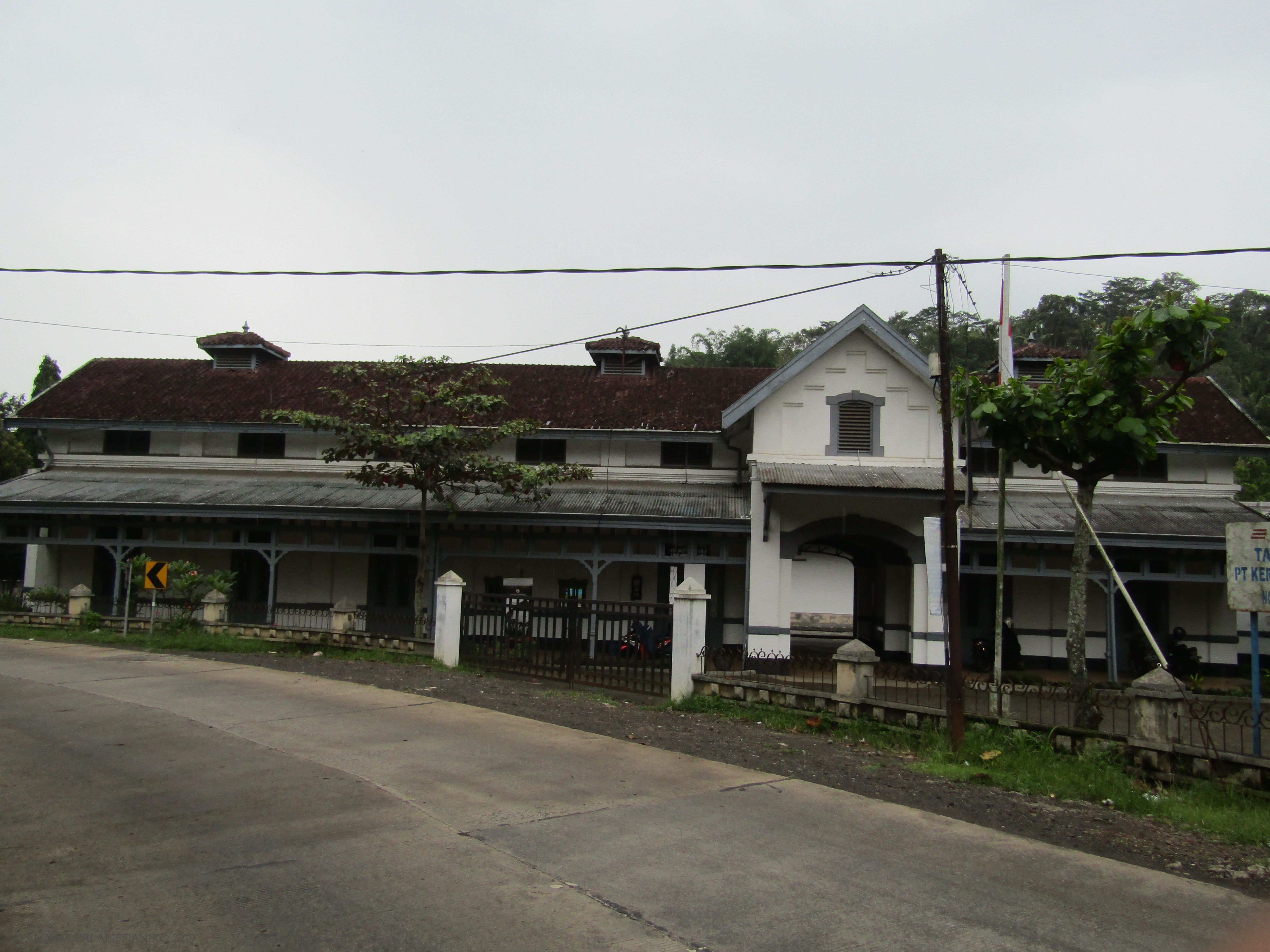 Tampak depan Stasiun Tuntang, 2019